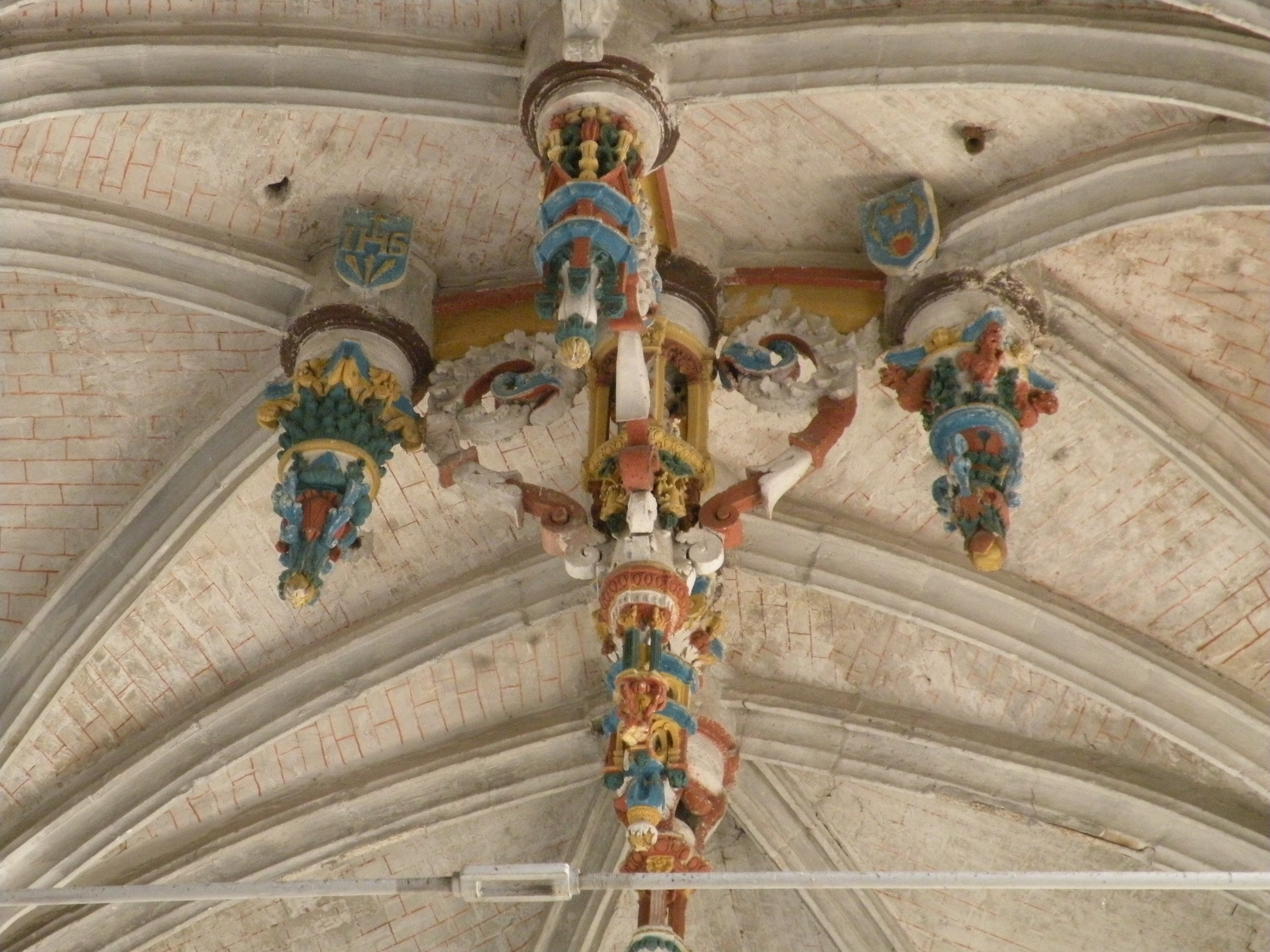 Église Saint-Denis de Sérifontaine voute